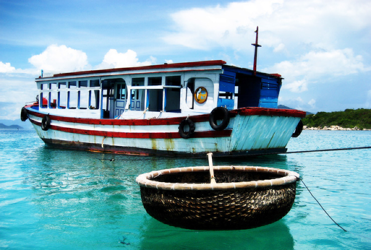 Thuyền thúng